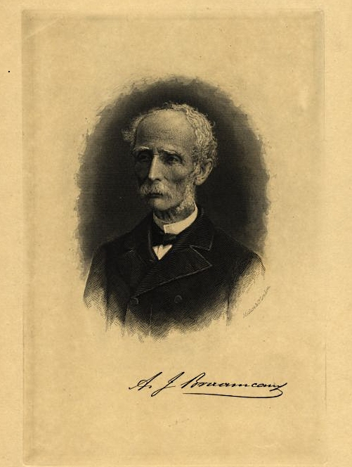 Der portugisiesche Minister und Ministerpräsident Anselmo José Braamcamp de Almeida Castelo Branco (1819-1885)